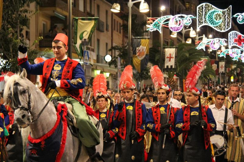 Entrada del 13 d'agost de 2011